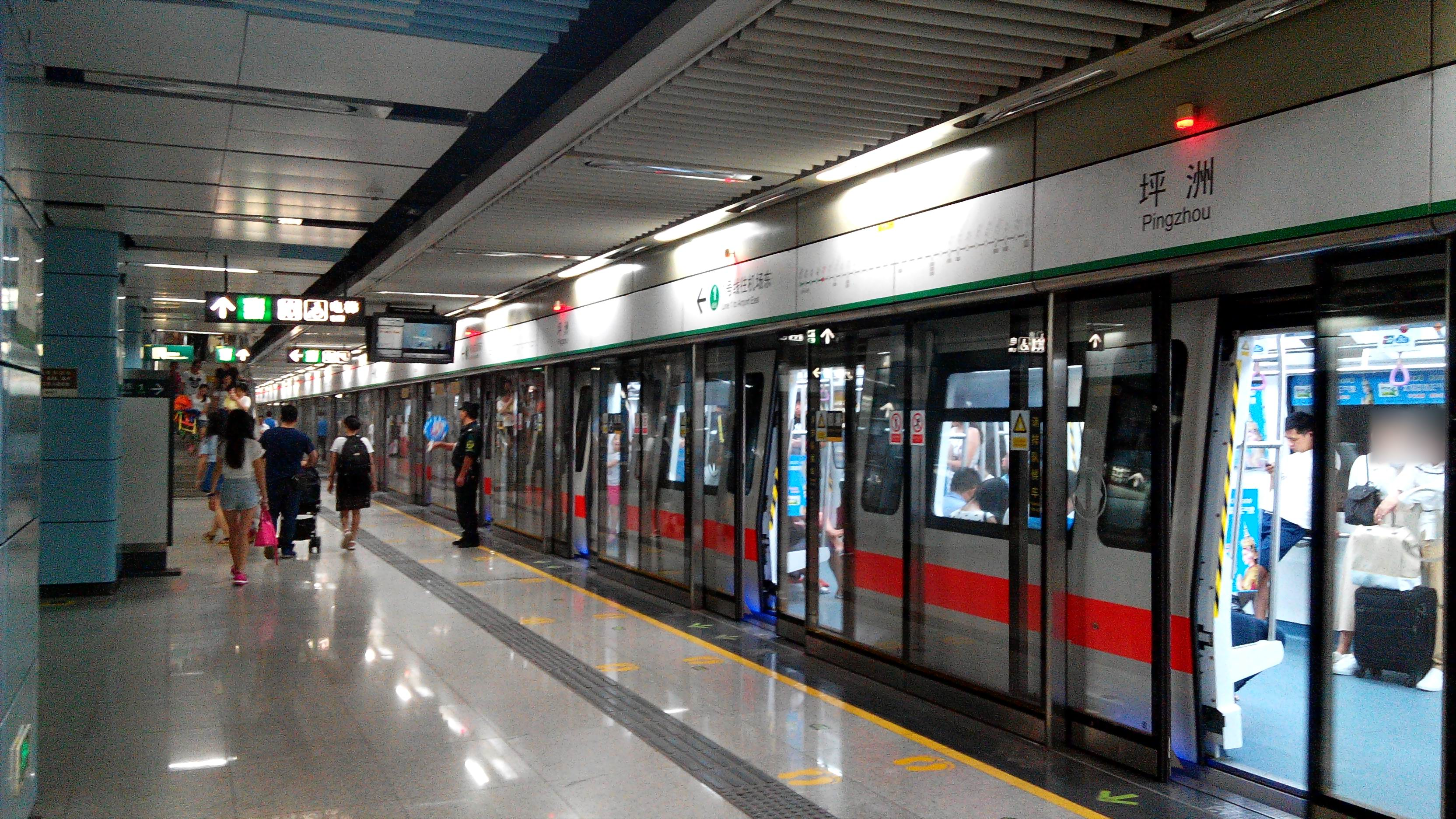 深圳地铁1号线 坪洲站 站台